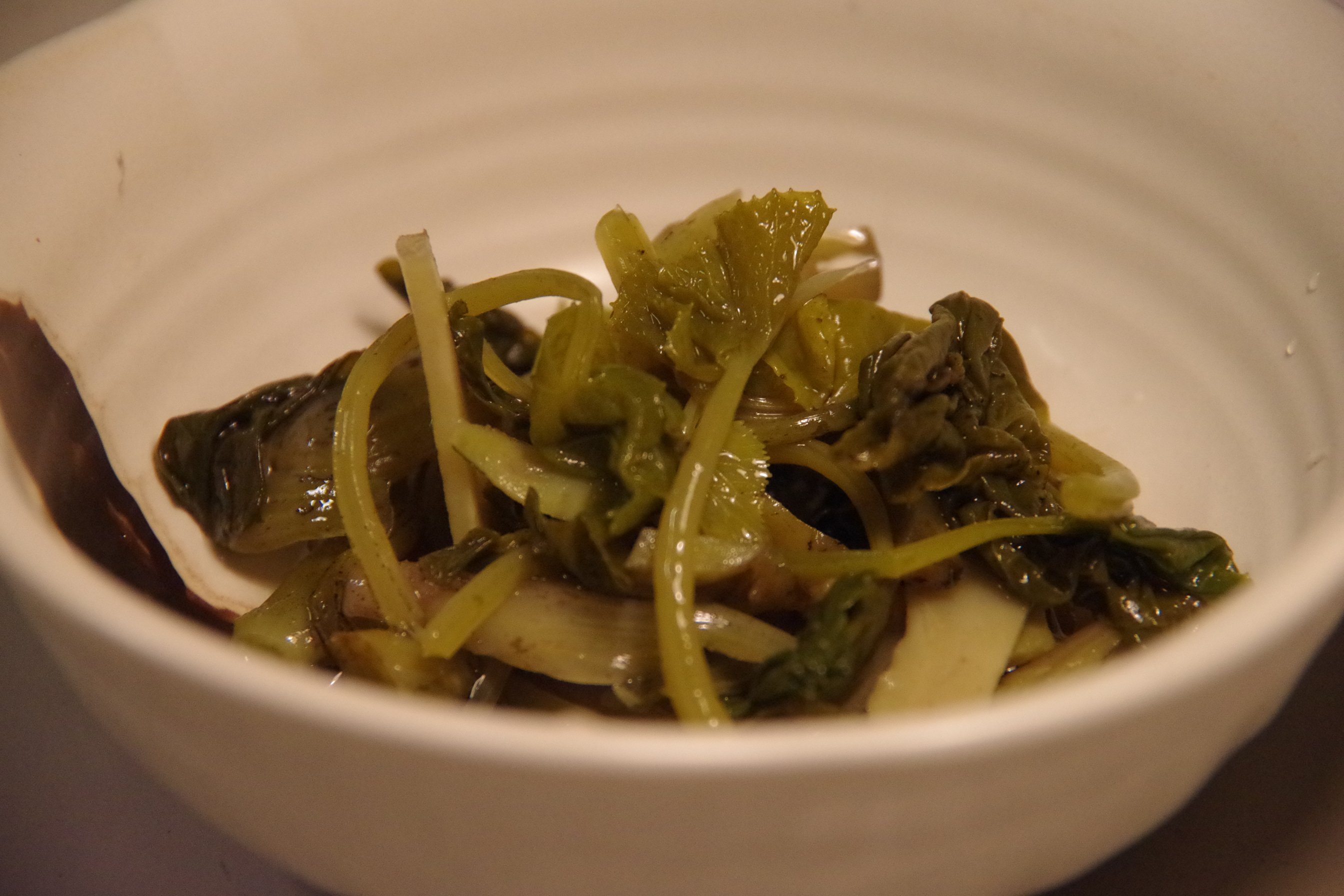 ワサビ漬（醤油）